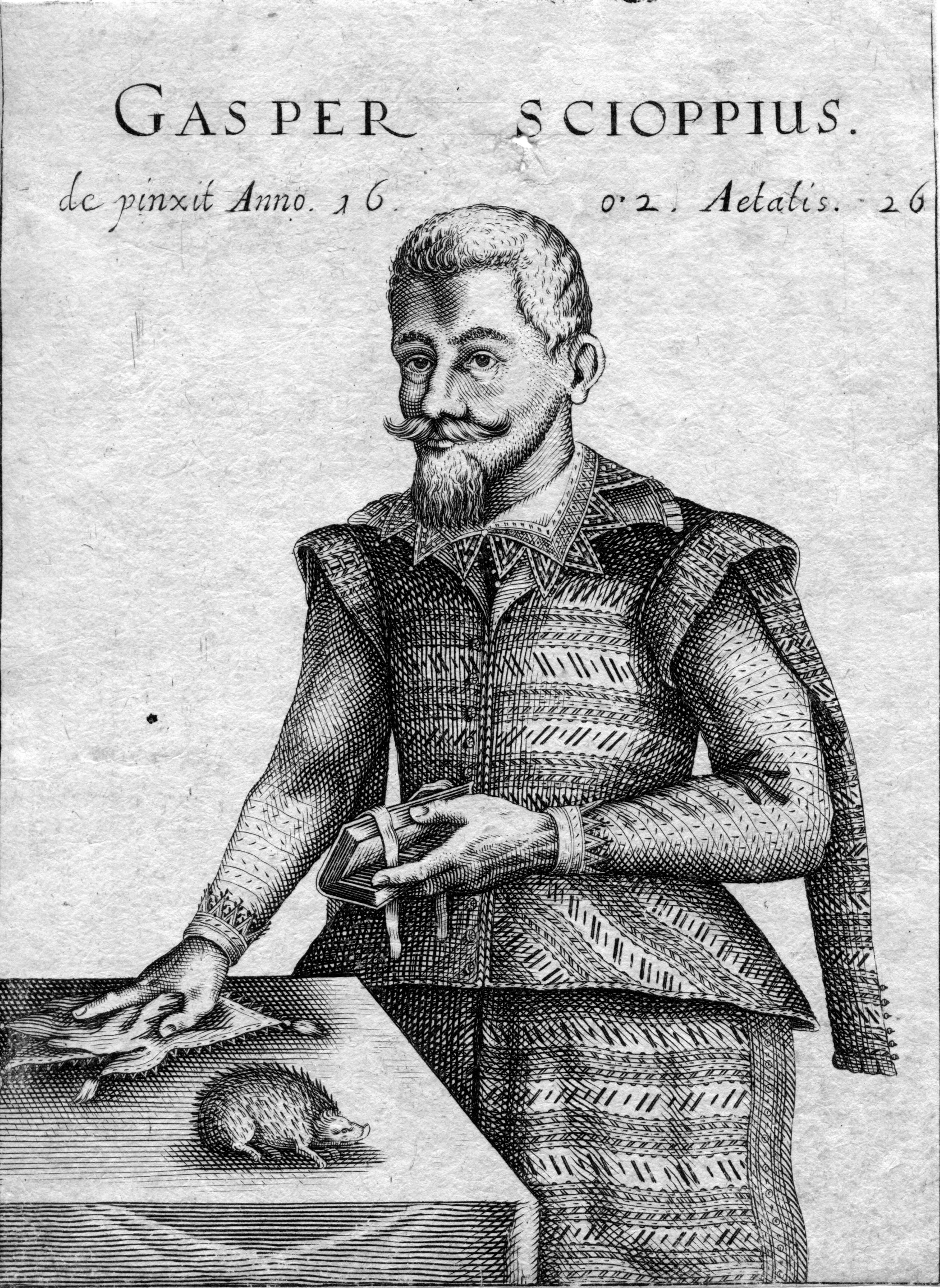 portrait gravé